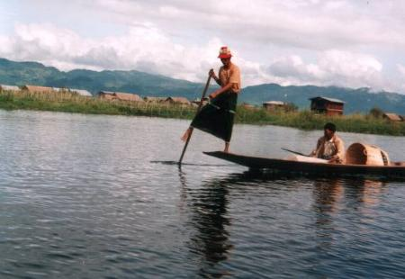 Beenroeier op het Inle meer in Myanmar